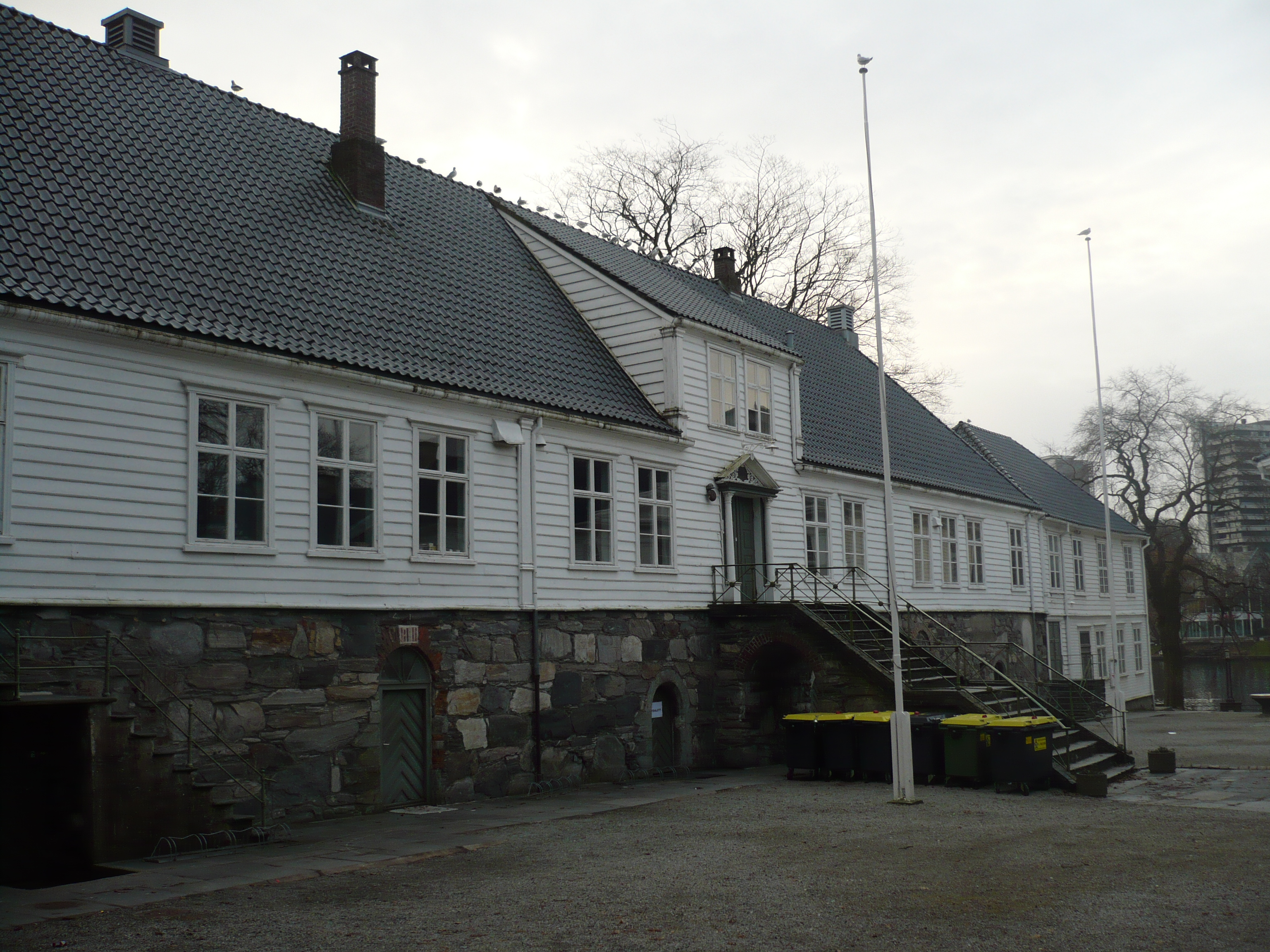 Hovedbygningen på Kongsgård i Stavanger